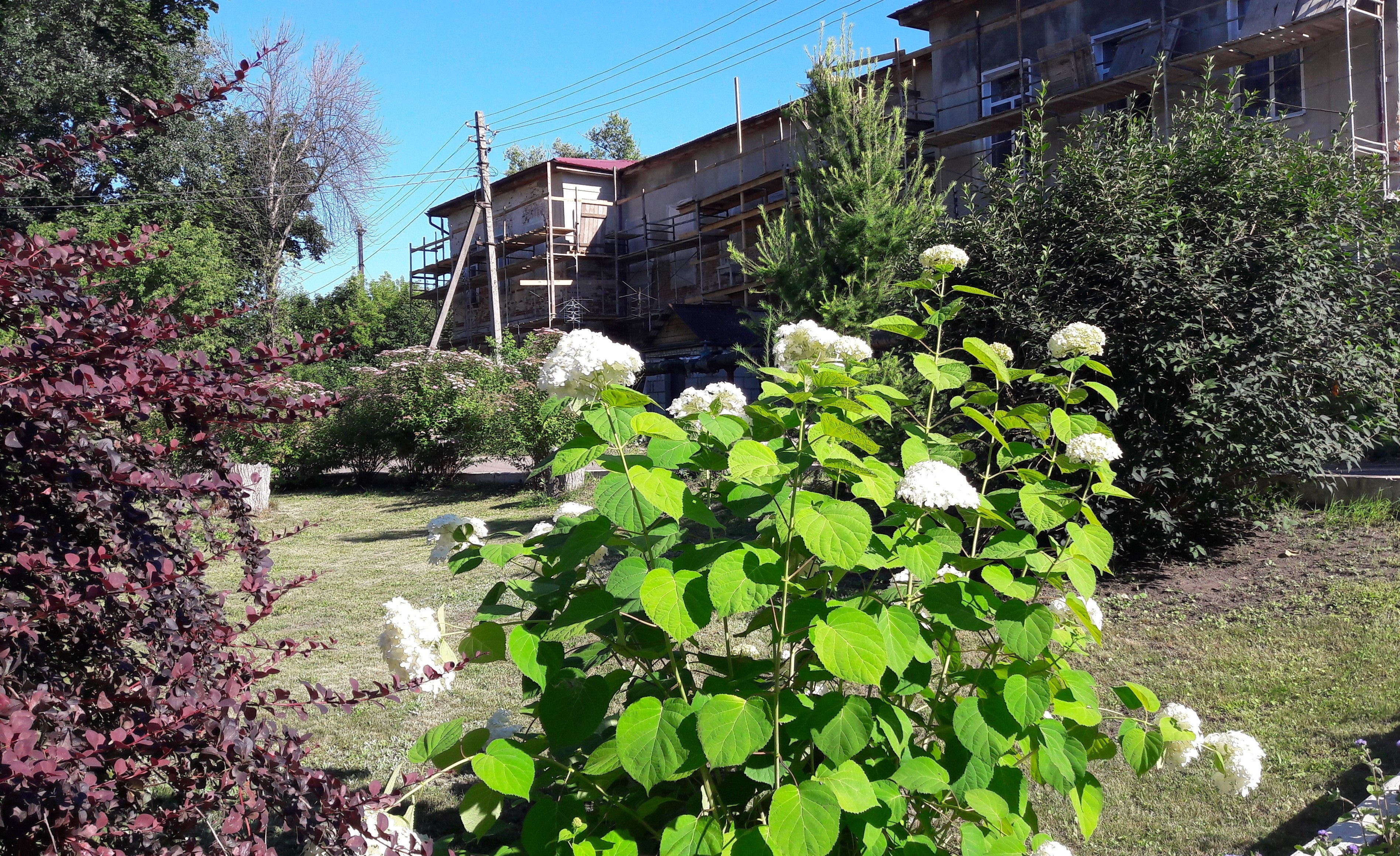 Вид на барский дом со стороны парка